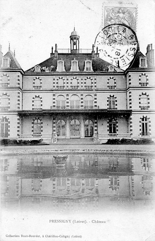 Le château de la Valette, Pressigny-les-Pins, Loiret, France